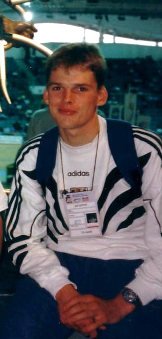 Thorsten Rund, deutscher Radsportler